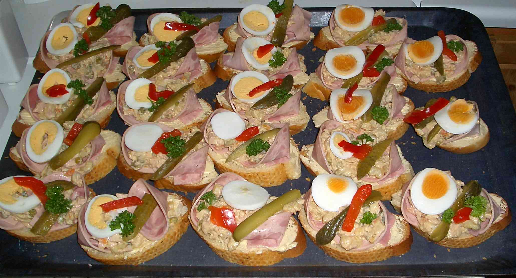 Obložené chlebíčky Typical snack of Czech Republic